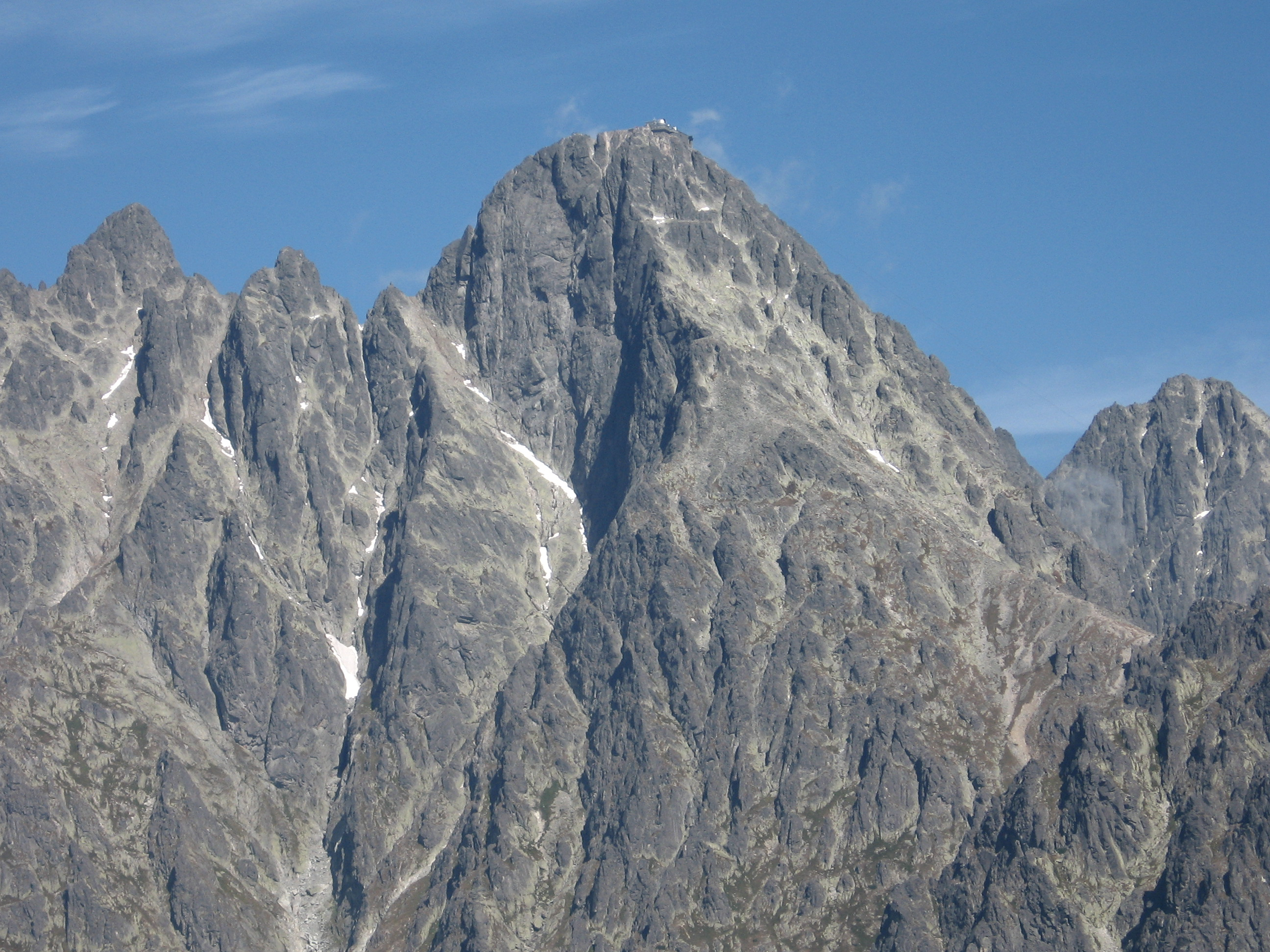 Lomnicky stit from Slavkovsky stit